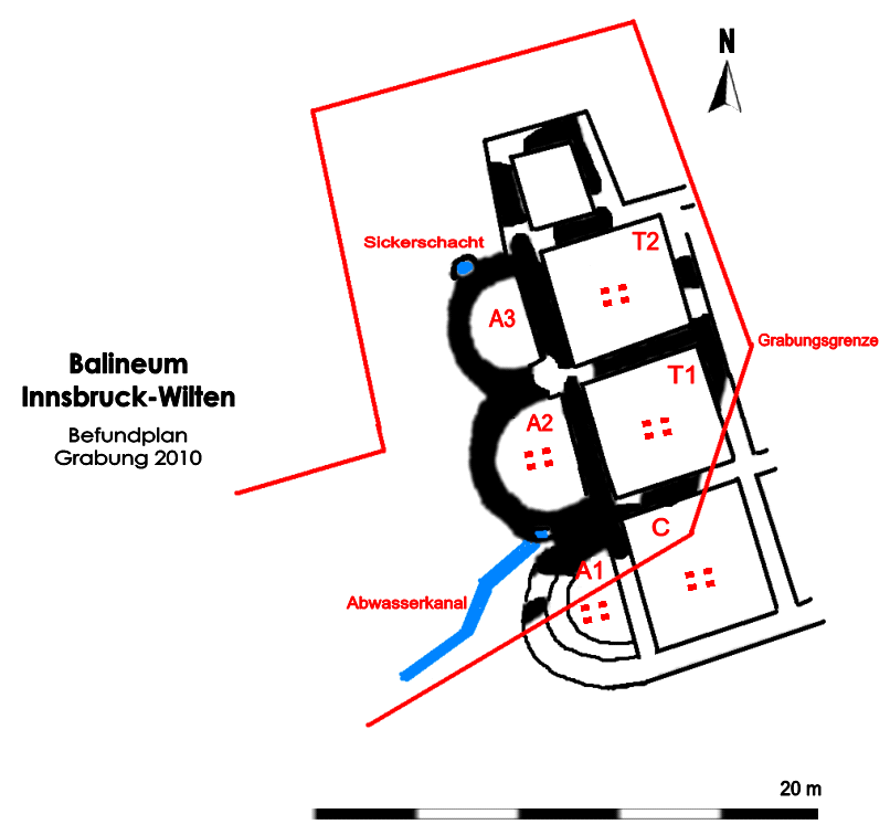 Römisches Badegebäude des Vicus von Veldidena, 3. bis 4. Jahrhundert n.Chr. in Innsbruck-Wilten. Befundskizze der Grabung von 2010, Anton Höck.